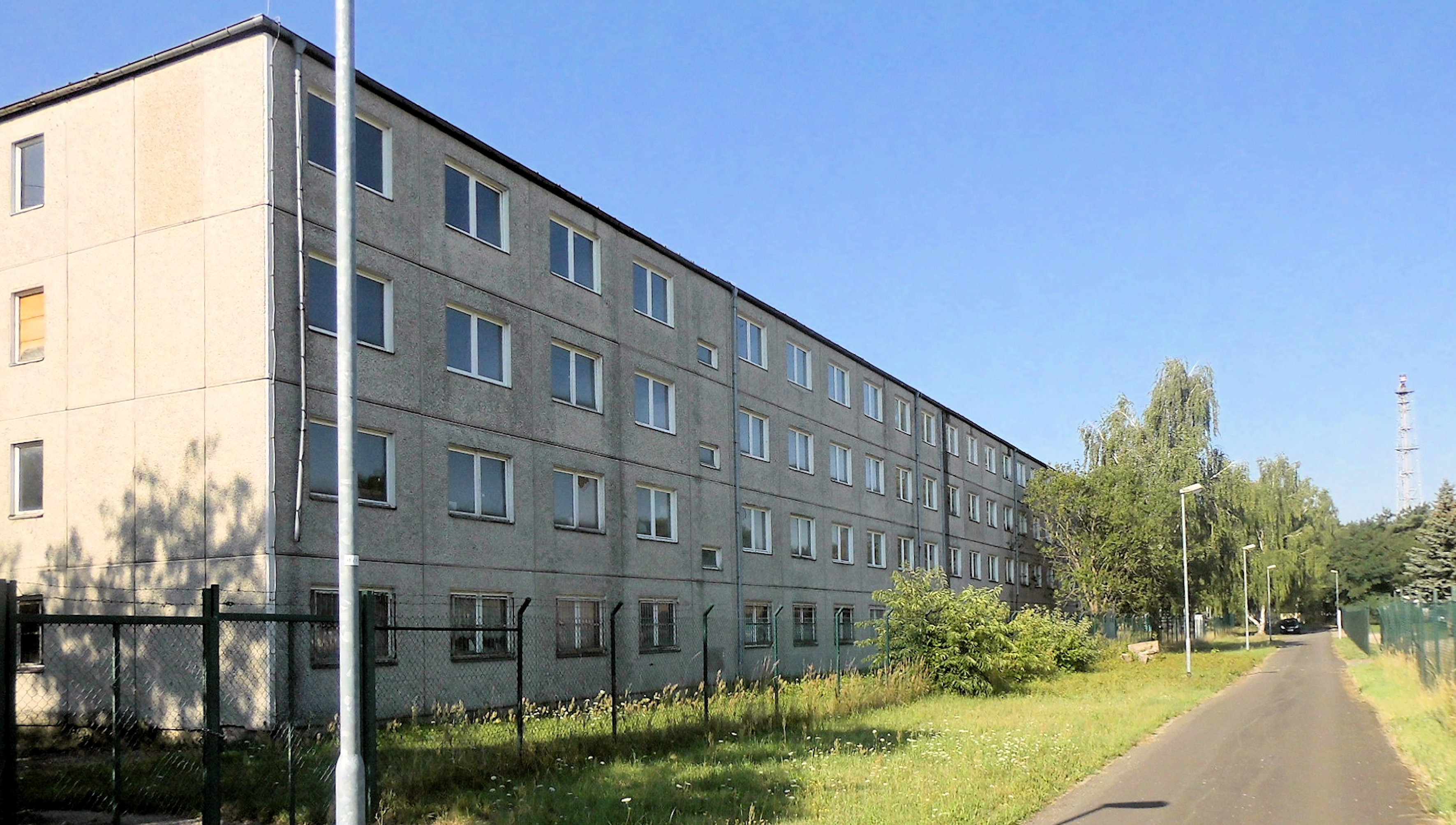 Unterkunftsblock des ehemaligen Militärgefängnisses in Schwedt/Oder